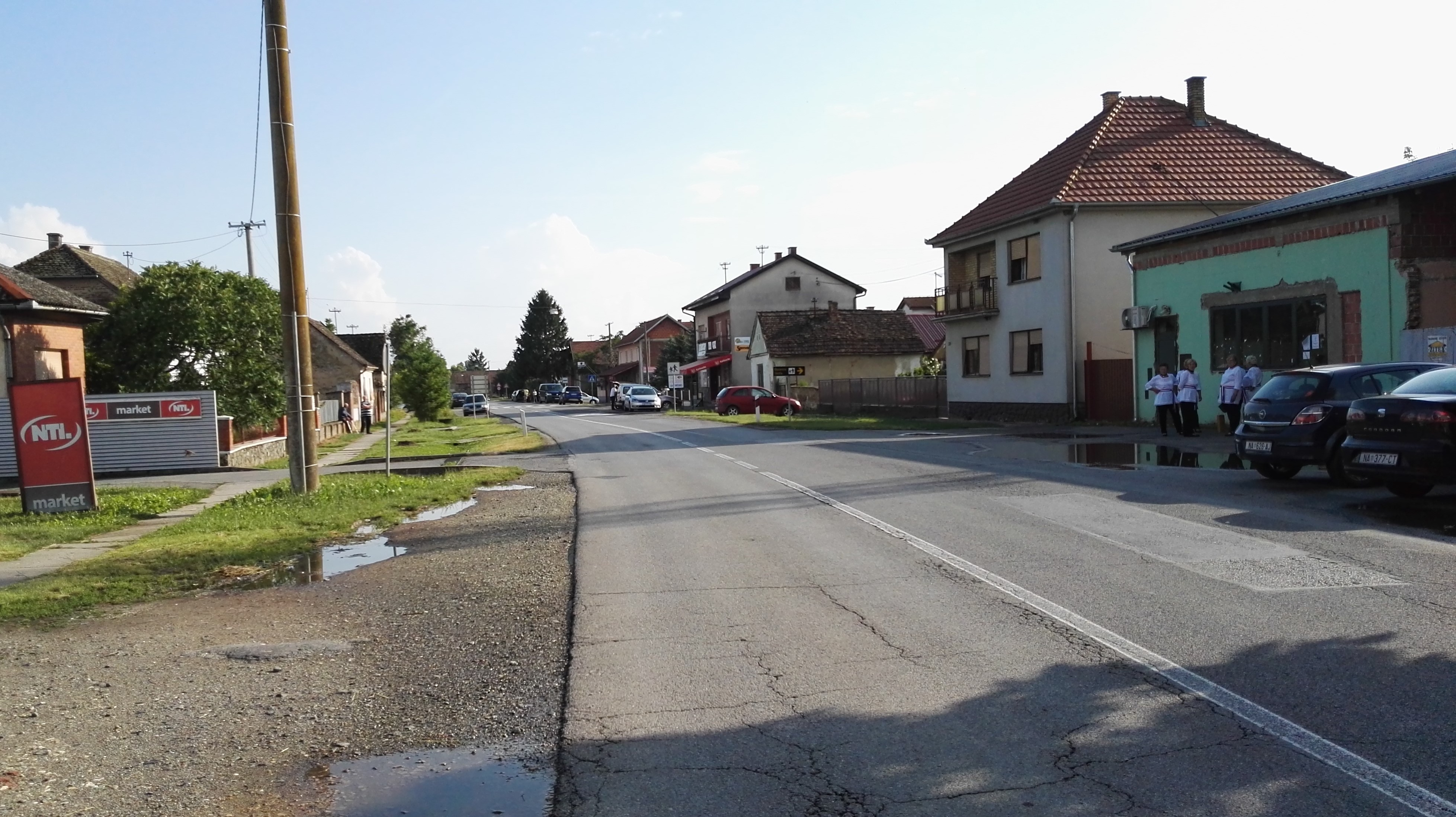 Srpskohrvatski / српскохрватски: Beničanci, glavna ulica